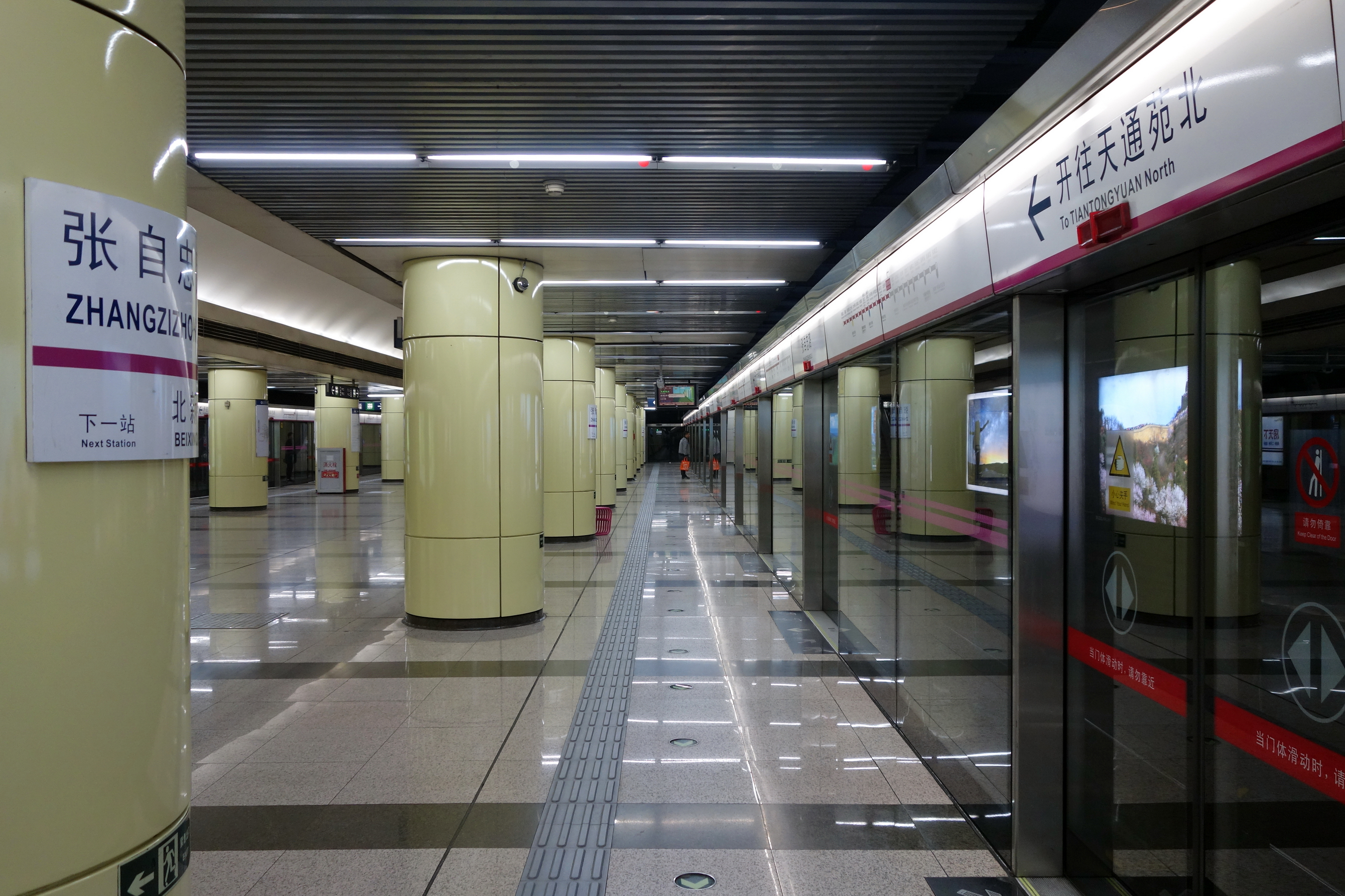 北京地铁5号线张自忠路站站台